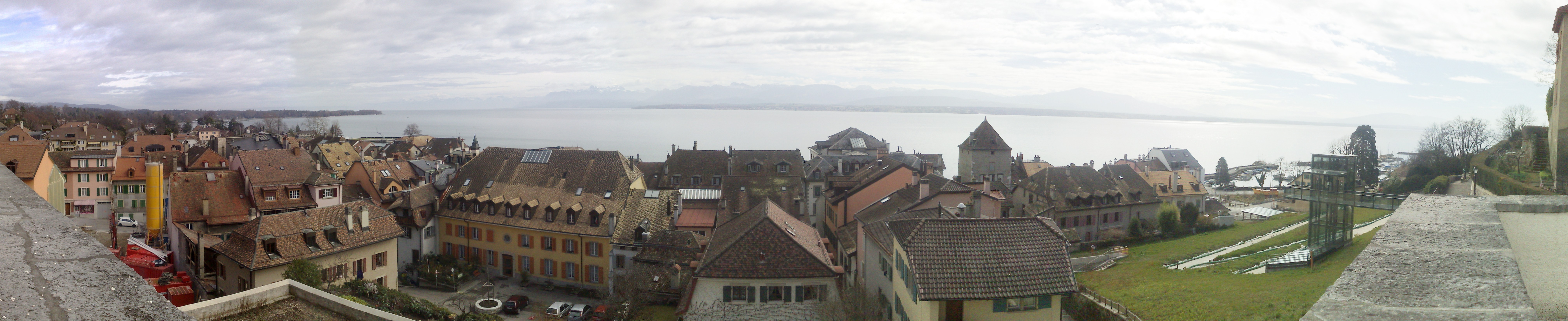 Panorama du lac et du quartier de Rive depuis le château de Nyon